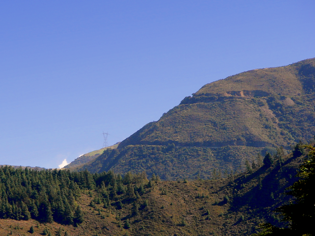 Carretera trasandina ascendiendo el Páramo de La Negra, en el estado Táchira.